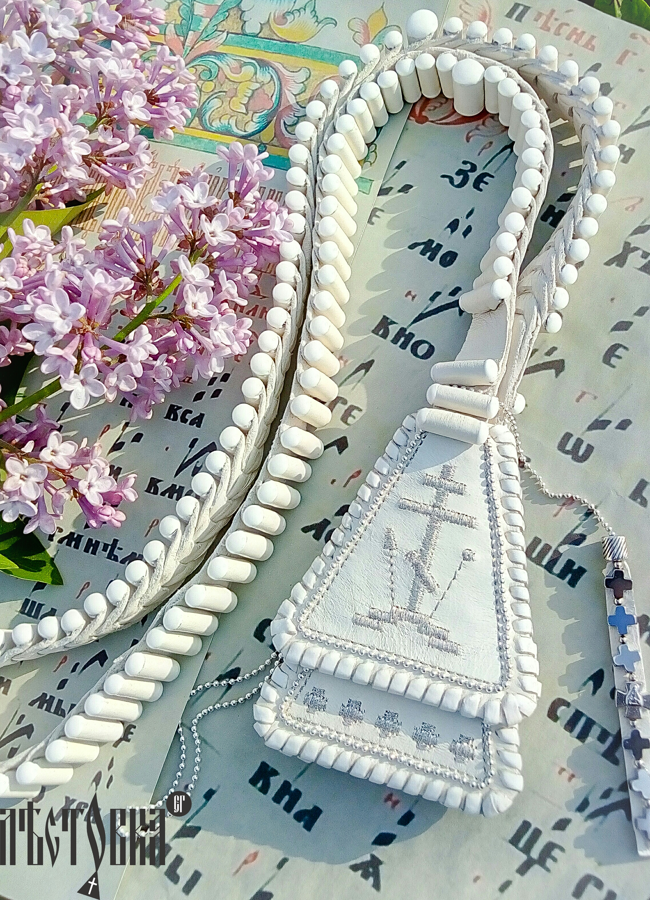 Современная Лестовка, сделаная с сохранением всех древних традиций